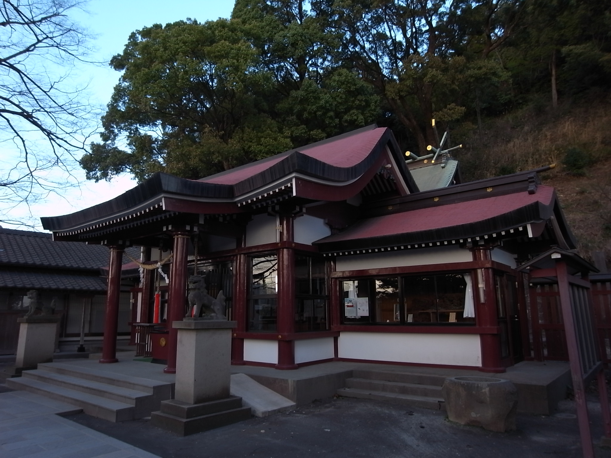 鹿児島県鹿児島市、鹿児島神社拝殿